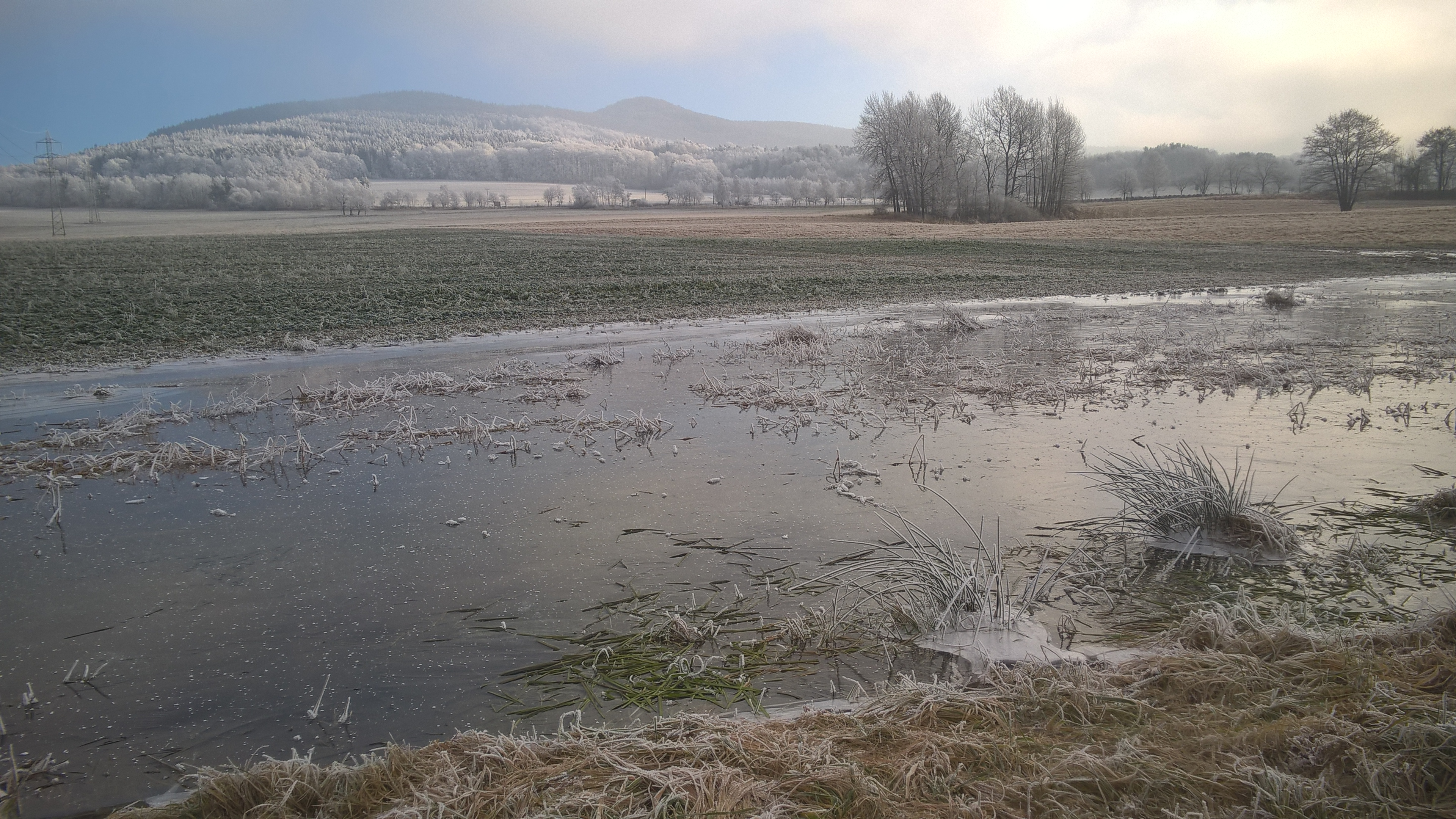 Jítravské sedlo - pohled od cesty na Bílé kameny na Jítravský vrch a Velký Vápenný